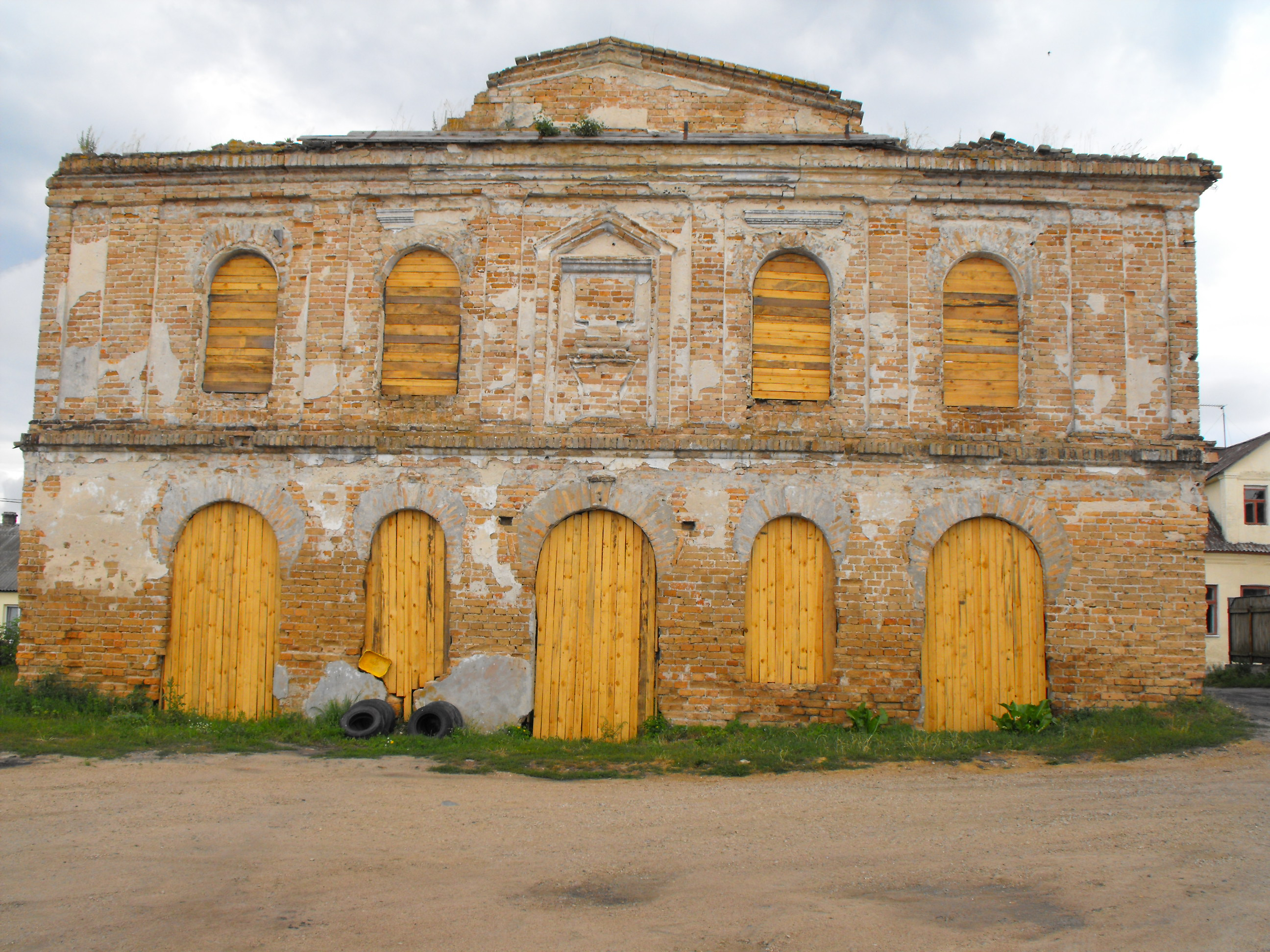 Здание бывшей синагоги евреев-"литваков" в Столине в районе улицы Тельмана.